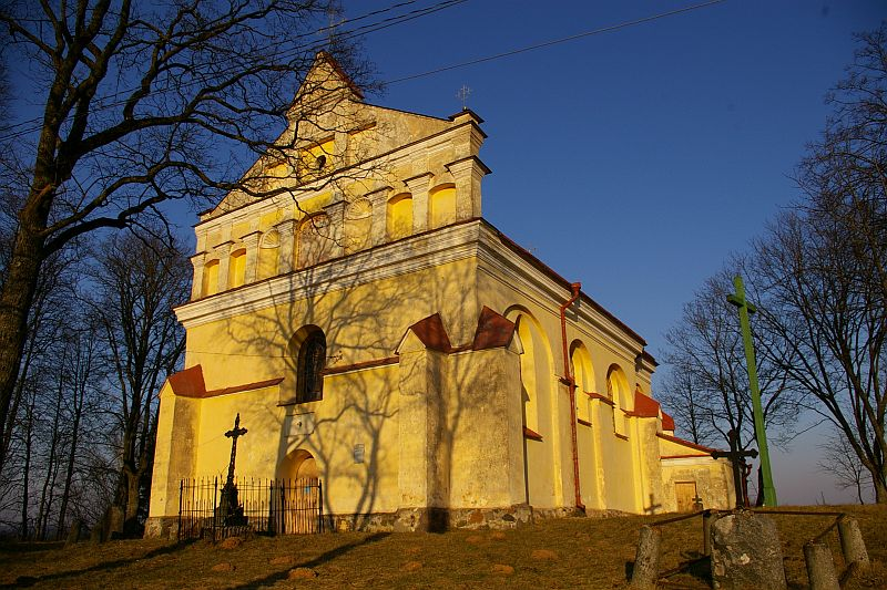 Rykantų Švč. Trejybės bažnyčia (Lietuva, Trakų rajonas). The church of Rykantai (Lithuania)